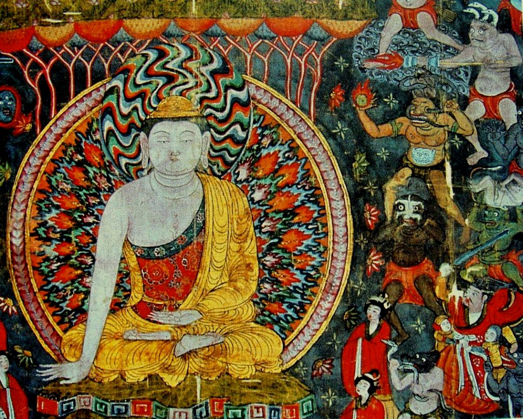 Мара испытывает Будду. 10в. деталь. Гиме